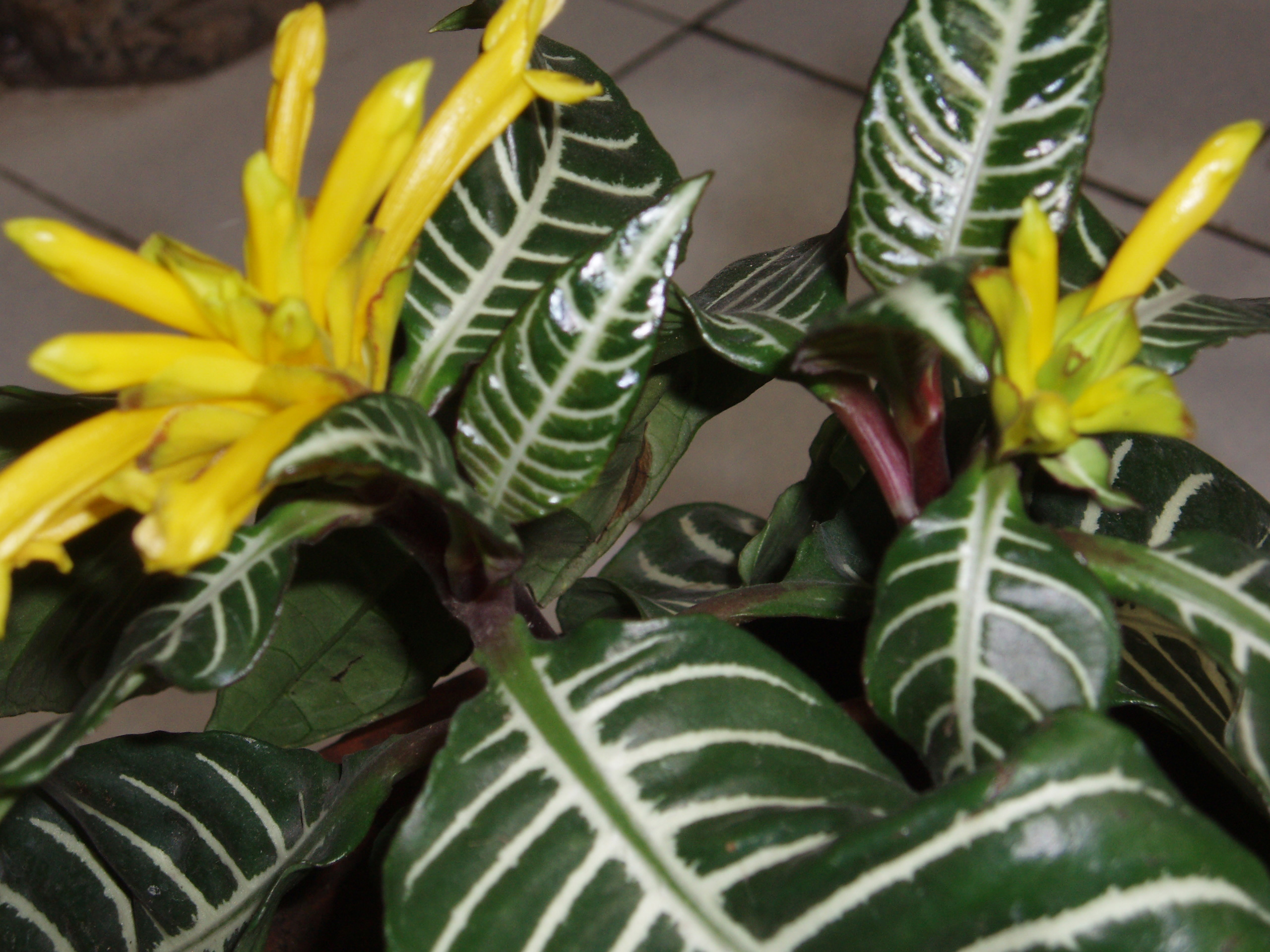 Zebra plant flowers